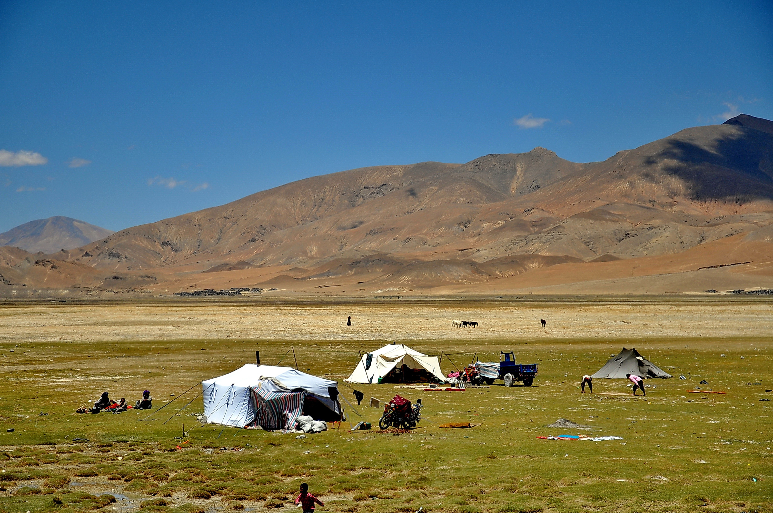 Nomades sur les hauts-plateaux du Tibet